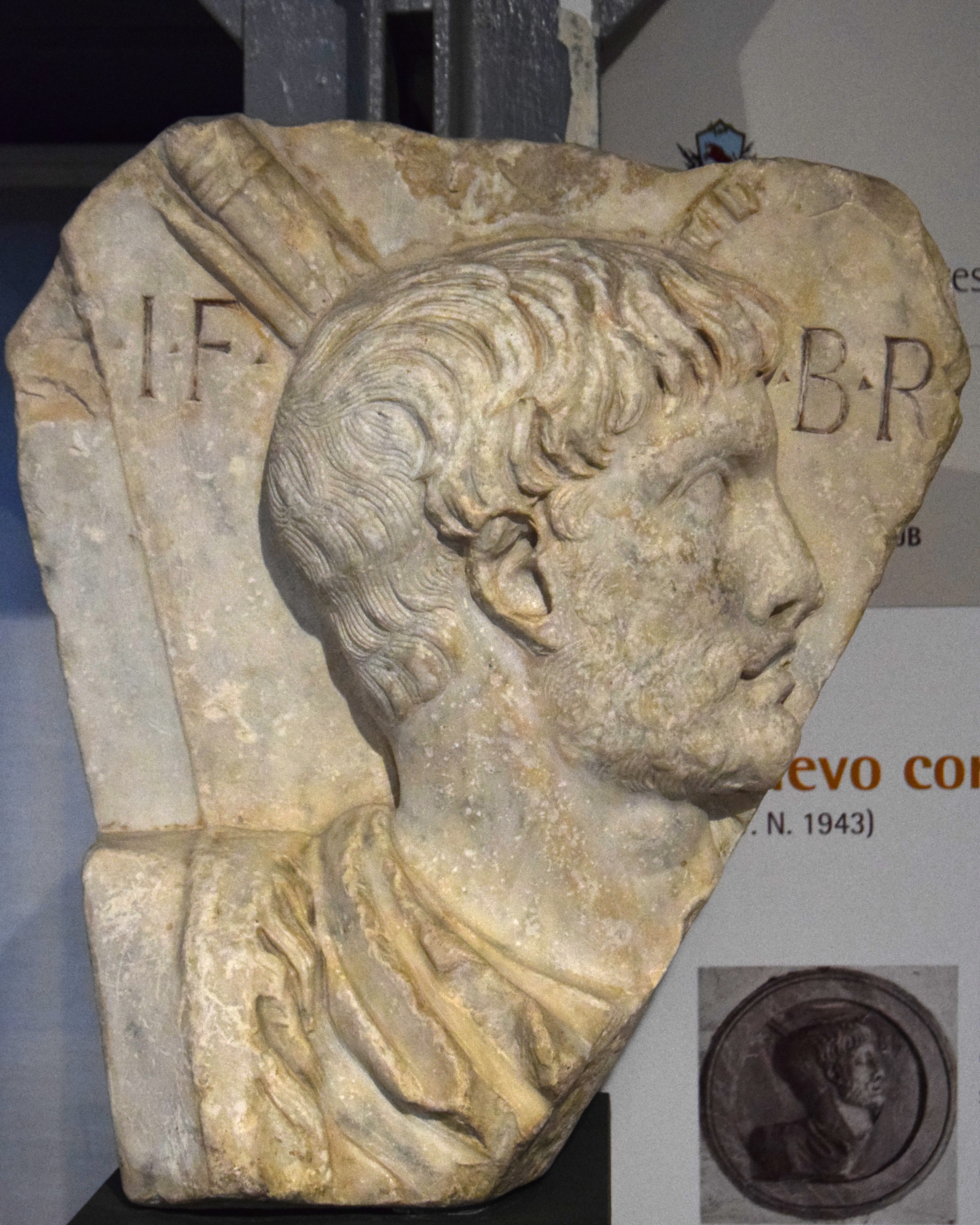 Testa popolarmente creduta di Federico II, proveniente dal Casino del Principe di Calvi (BN) e ora custodita al Museo del Sannio